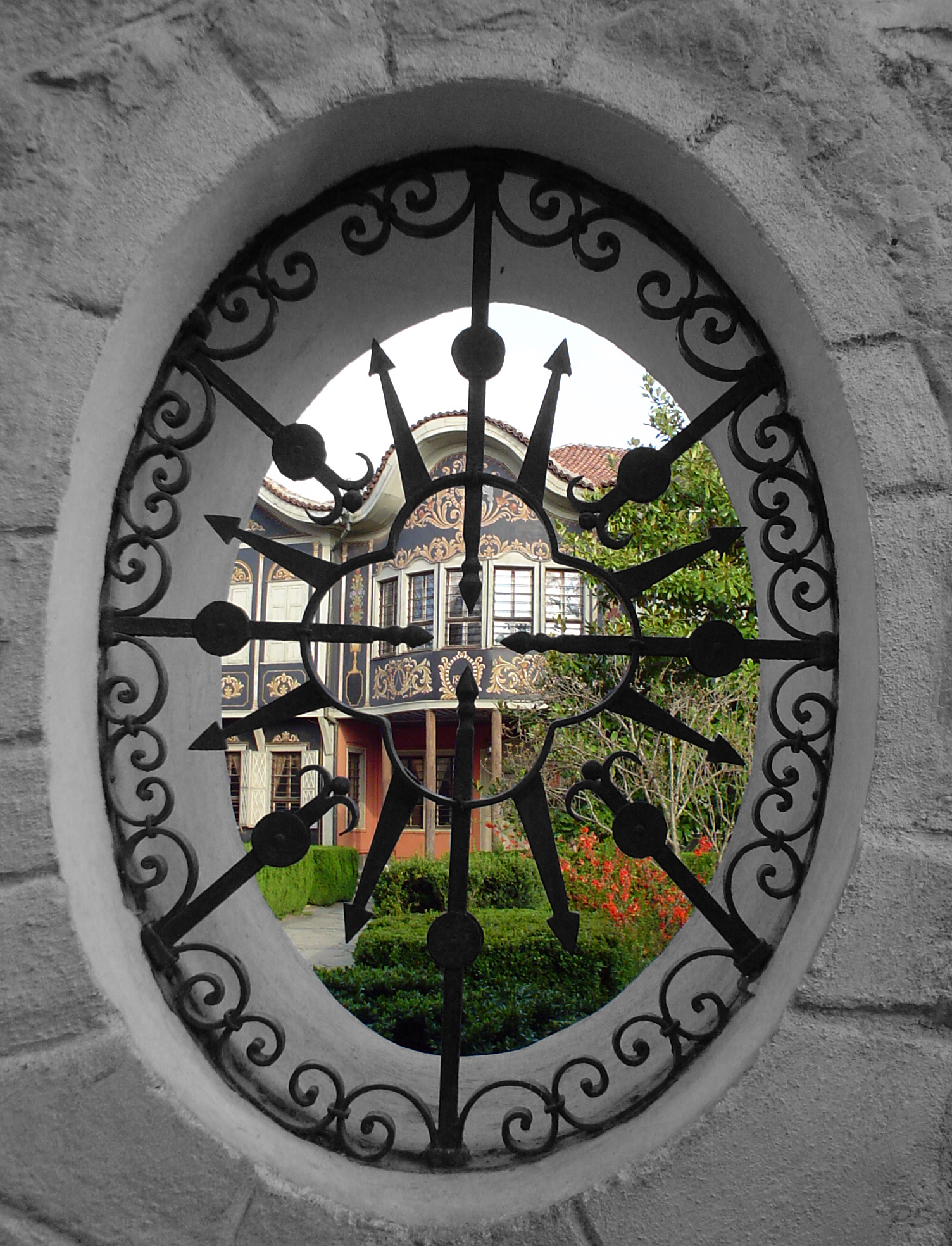 Ethnographic museum, Plovdiv, Bulgaria